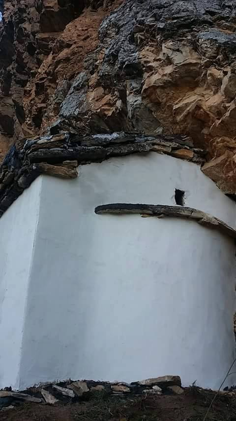 Црква Св. Благовештение, Јелошник.